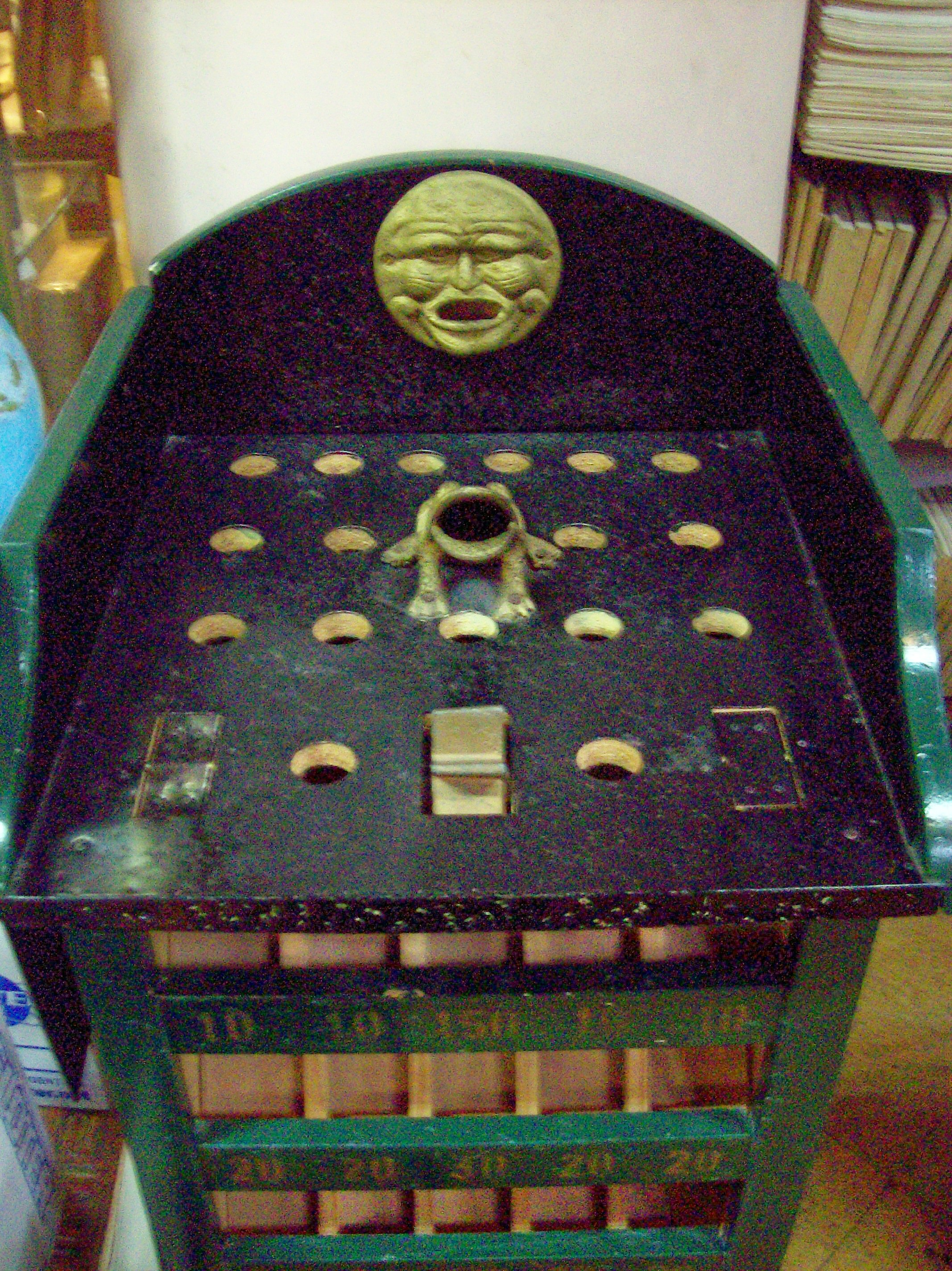 "Juego del Sapo" o "Juego de la Rana", según el país en que se lo nombre.